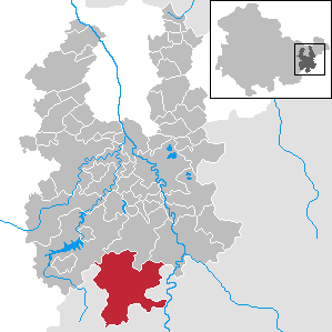 Vogtländisches Oberland in Thuringia - District Greiz